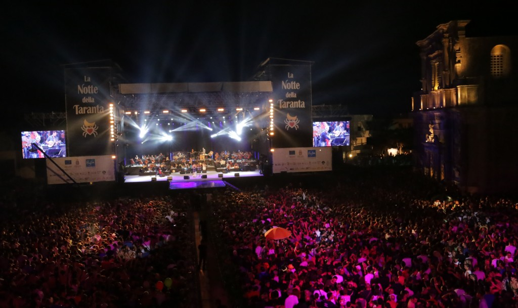 Concertone finale a Melpignano